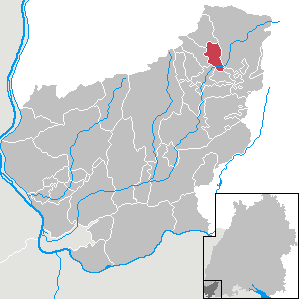 Utzenfeld, Landkreis Lörrach, Baden-Württemberg